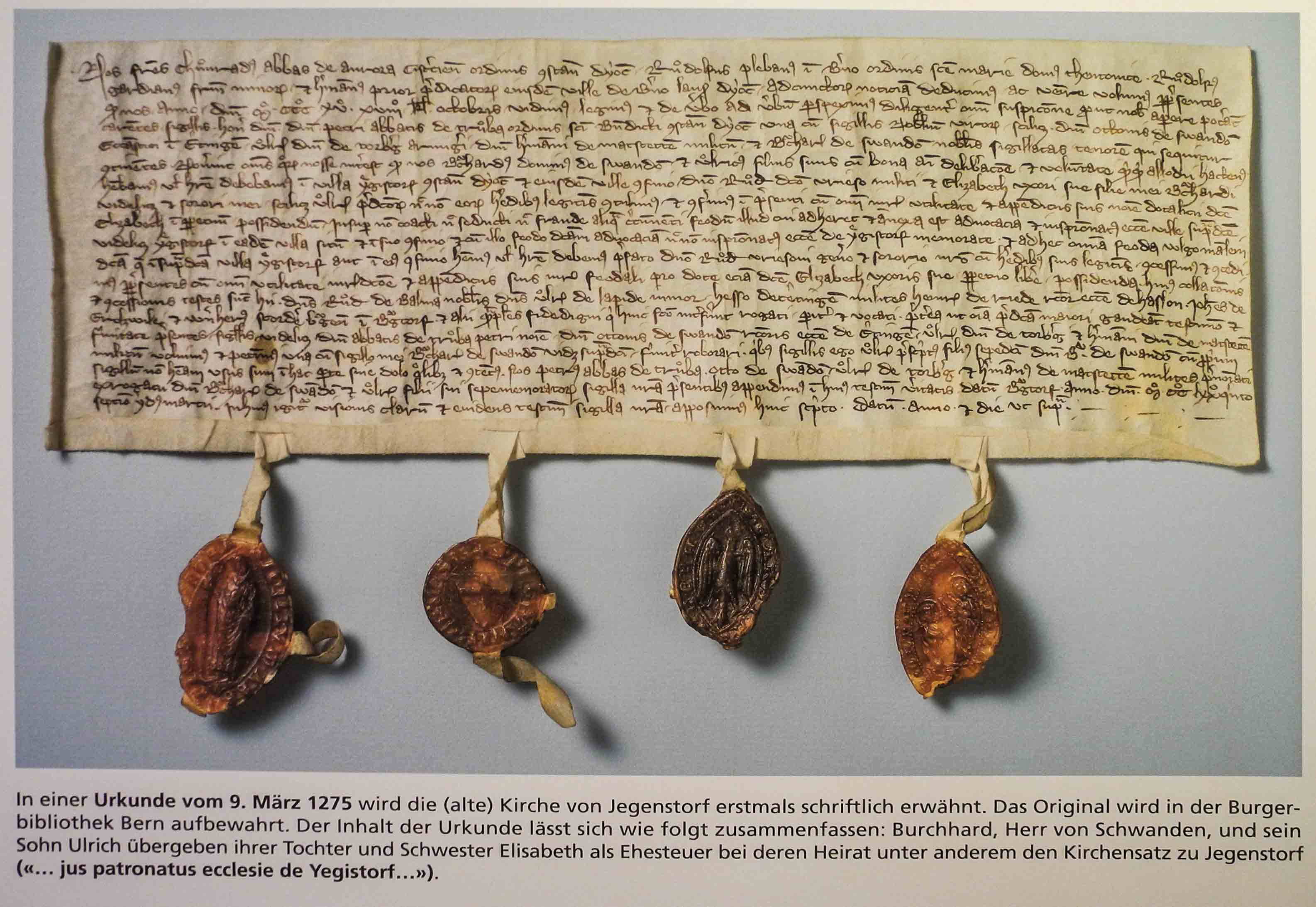 Ausstellung 500 Jahre Kirche Jegenstorf Urkunde mit Ersterwähnung der Kirche vom 9. März 1275